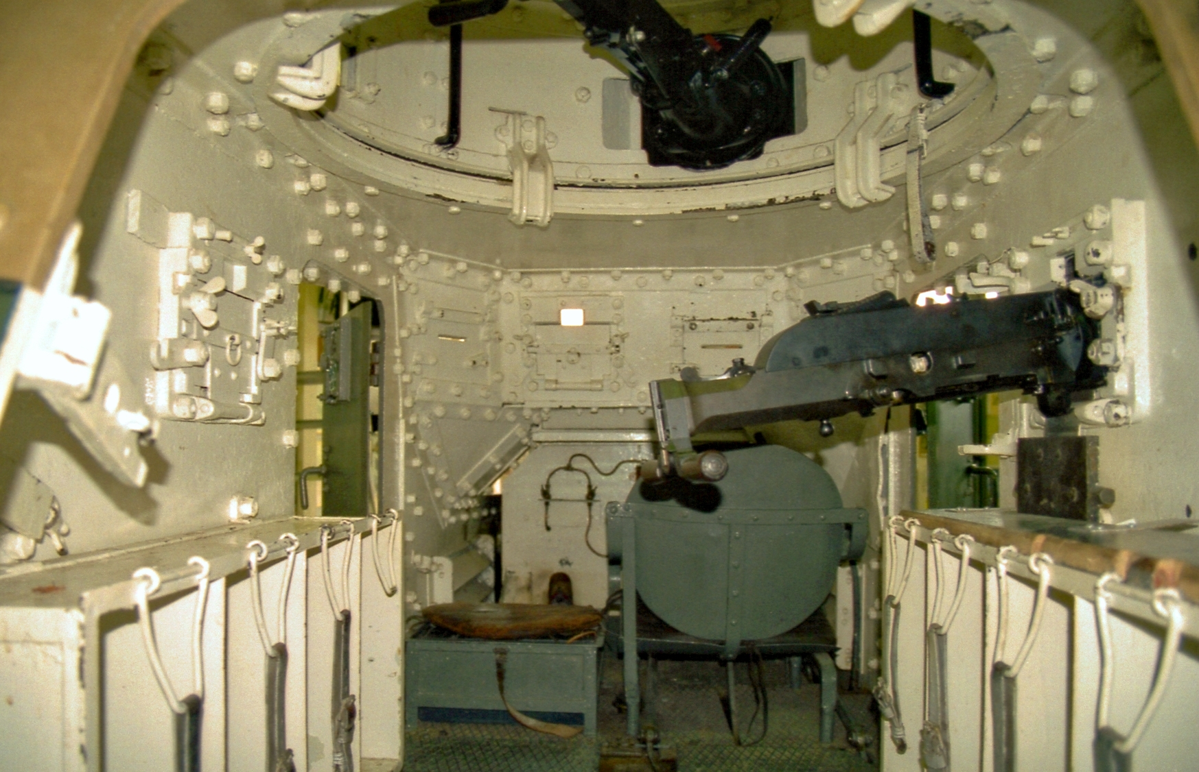 Stridsvagn m/21 (Innenansicht) im Panzermuseum Axvall (Schweden) am 31.05.2000